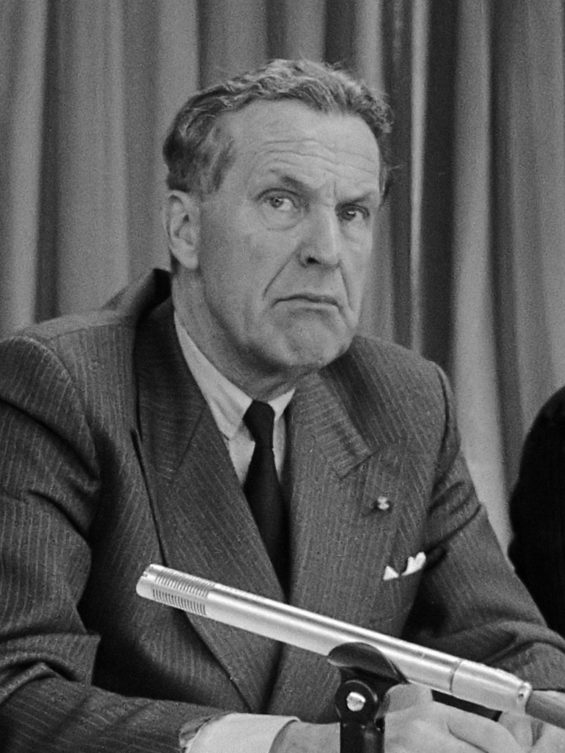 Persconferentie over de schietpartij door Cevdet Yilmaz in café het Koetsiertje in Delft waarbij zes mensen om het leven kwamen. 6 april 1983